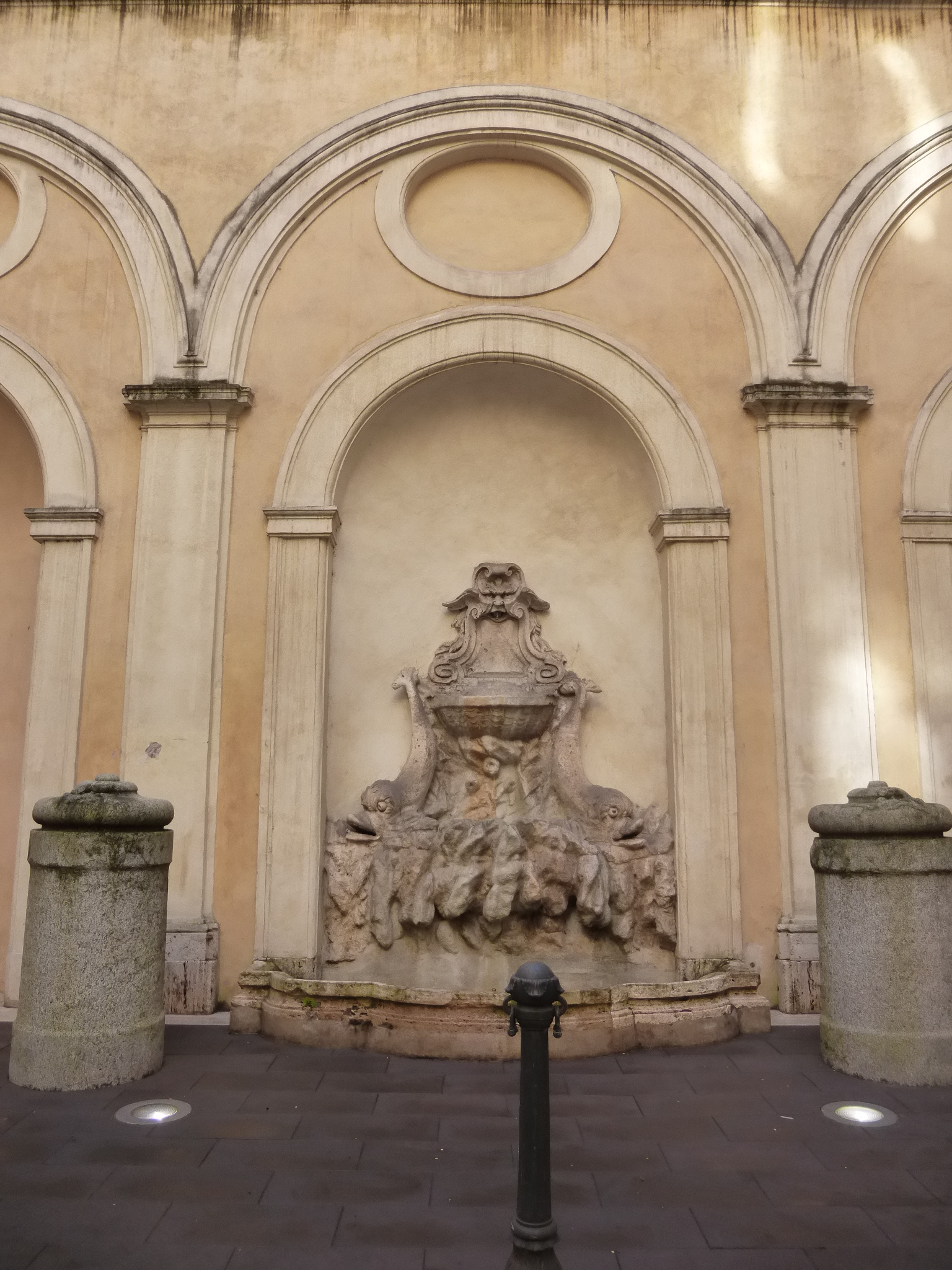 Roma, palazzo Cenci-Bolognetti, fontana del cortile.